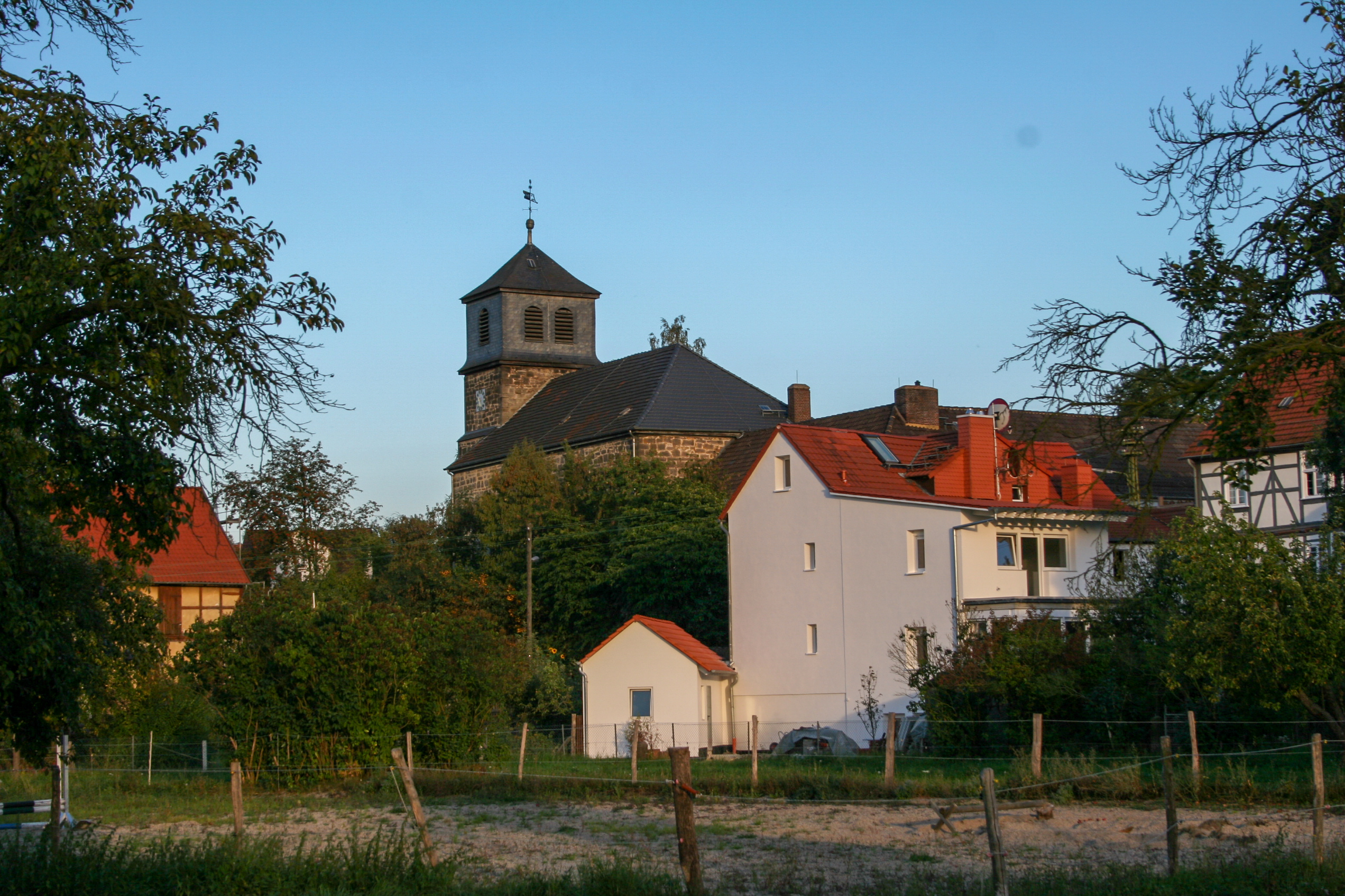 Historischer Dorfkern von Kassel-Oberzwehren